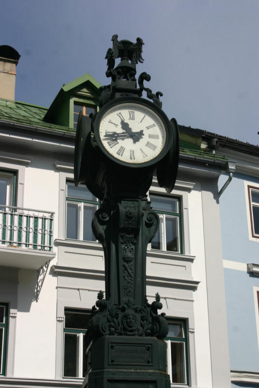 Autodynamische Uhr von Friedrich Ritter von Lössl